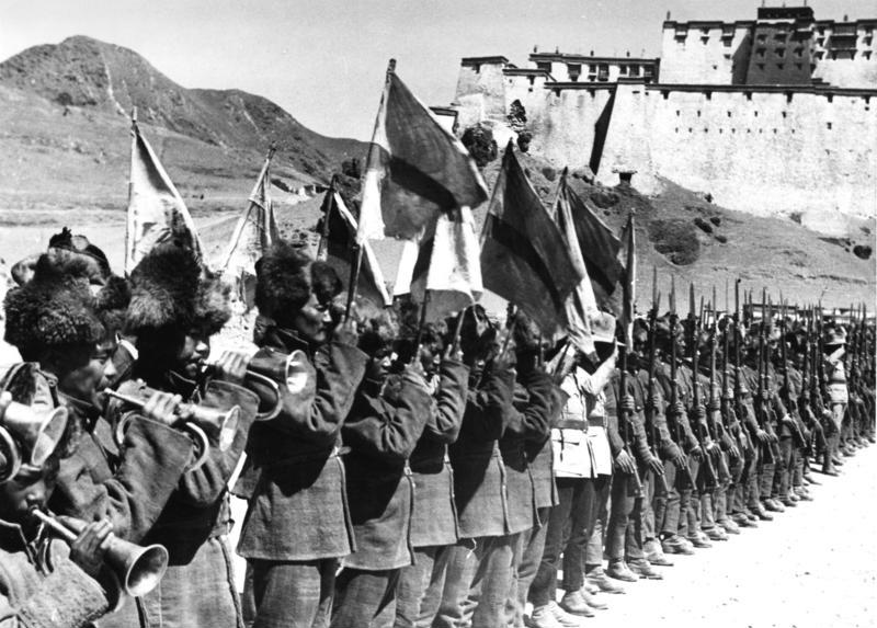 Schigatse, tibetisches Militär mit Dzong, Truppenparade